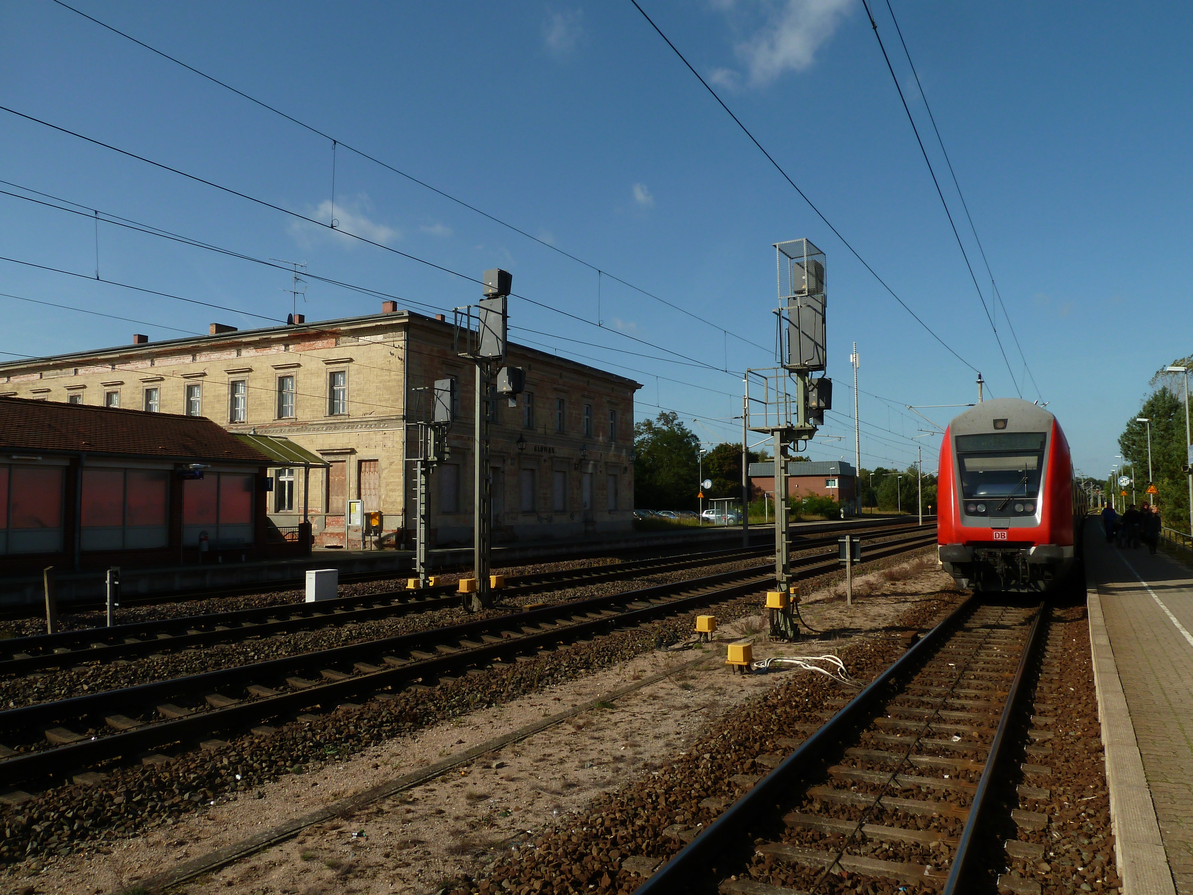 Bahnhof Glöwen (Baudenkmal), Bahnsteigseite